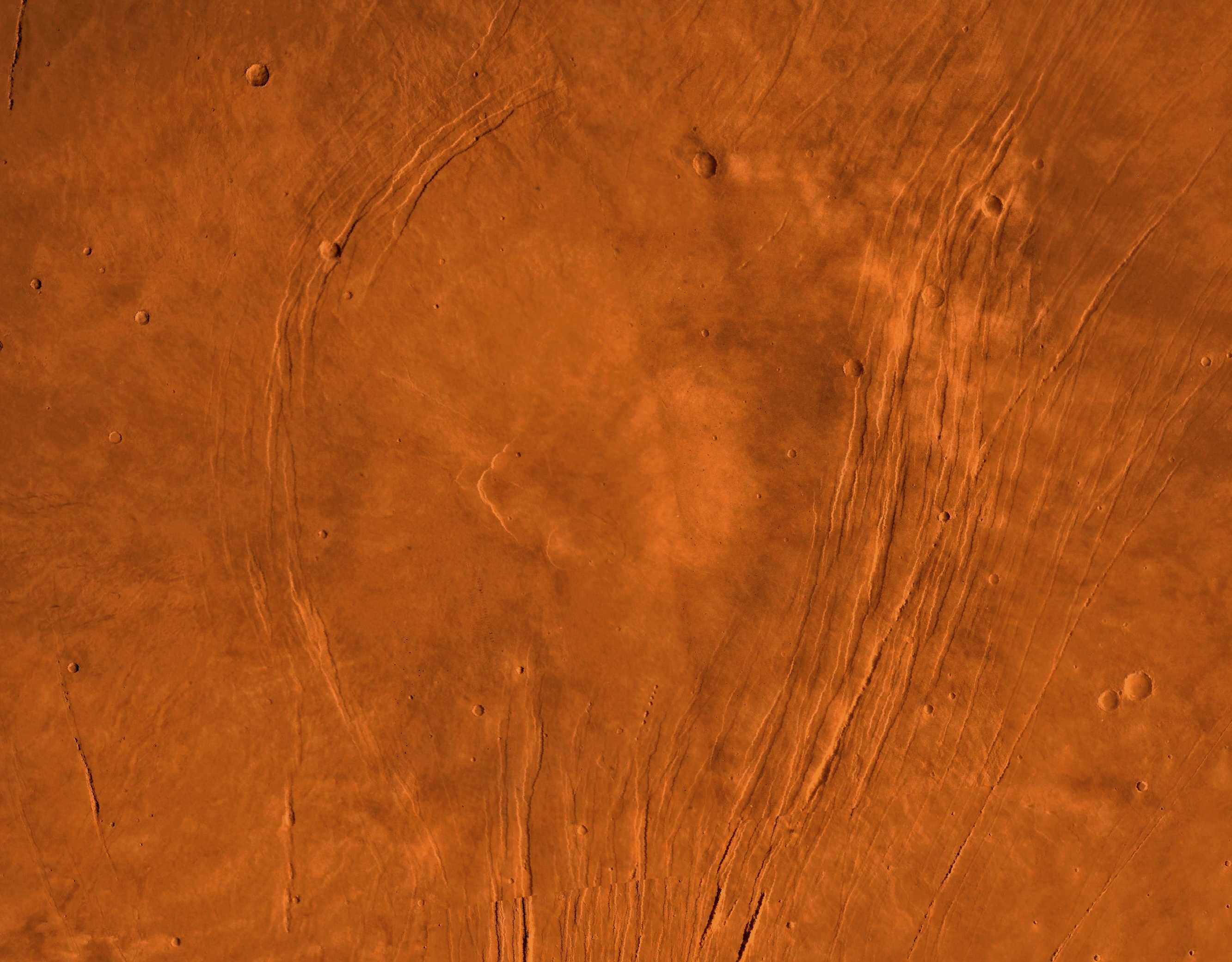 Zoom sur le volcan bouclier Alba Mons